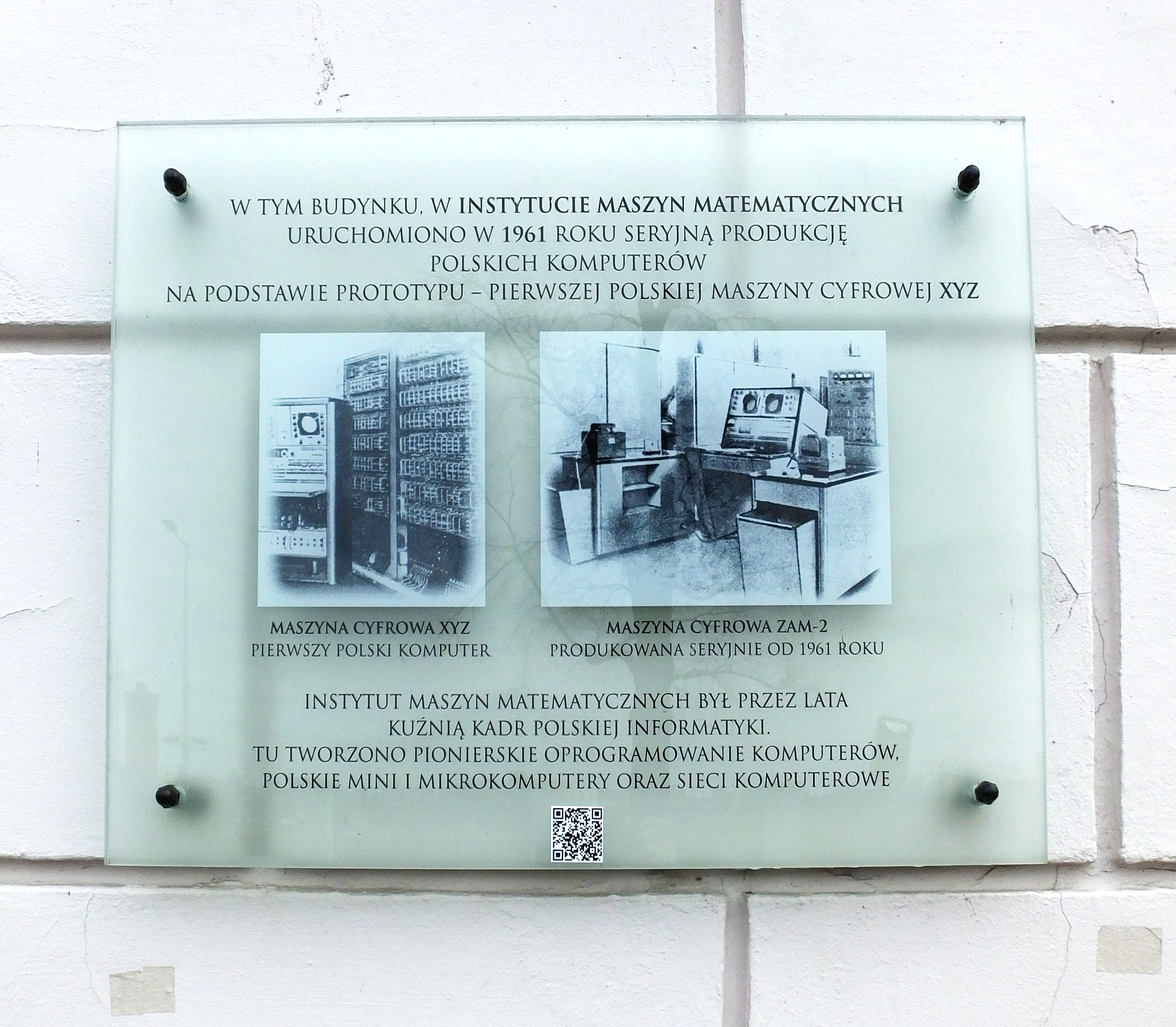 Jeden z budynków koszar jerozolimskich w Warszawie, przebudowany na Wojskową Szkołę Inżynierii, przez kilkadziesiąt lat siedziba Instytutu Maszyn Matematycznych, przekazany CBA